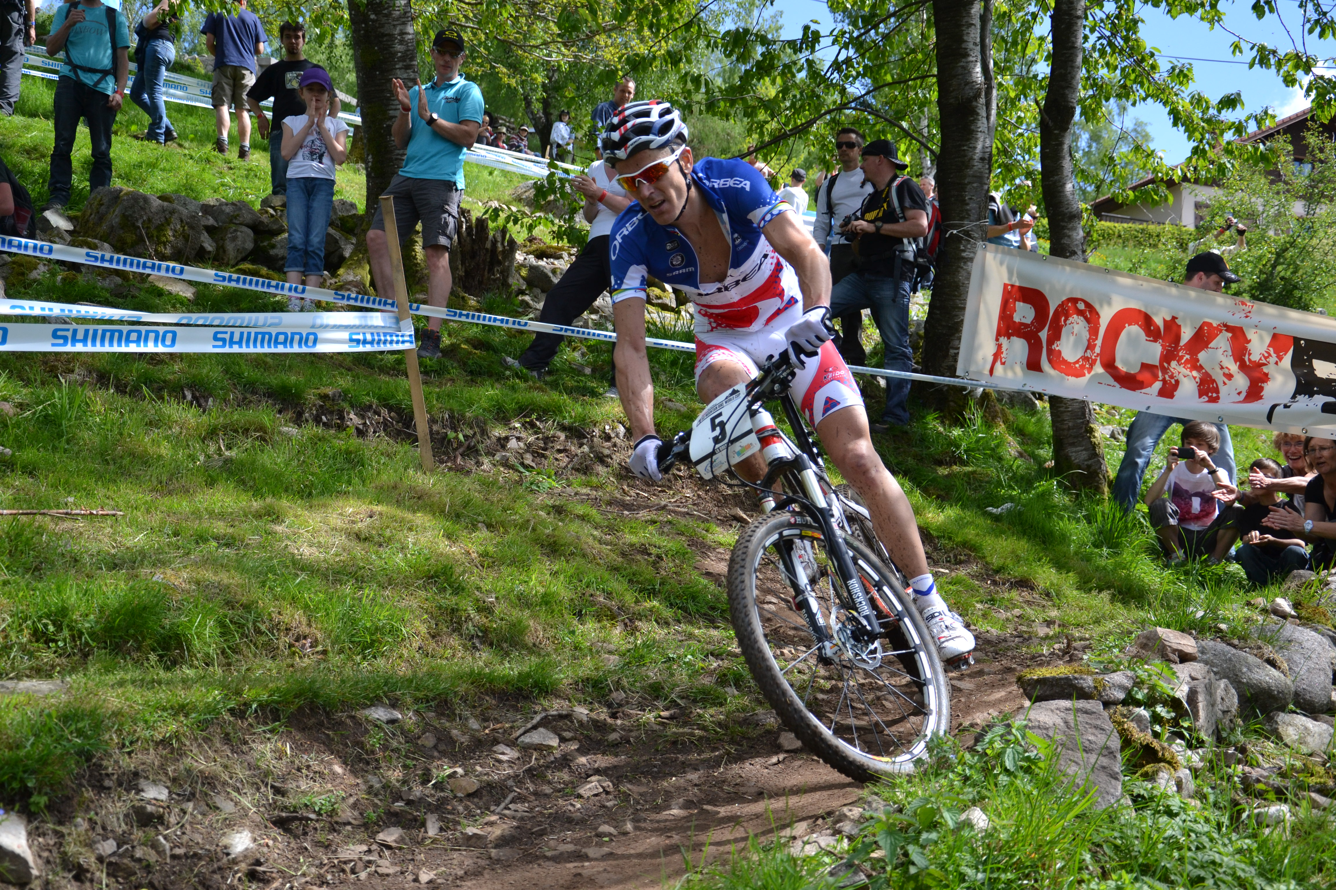 Julien Absalon lors de la 4e manche de la coupe du monde UCI de VTT 2012 à La Bresse (FRA).